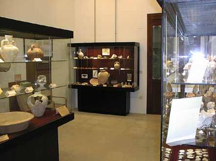 Vitrinas de la Sala de Arqueología del Museo Histórico de Aspe